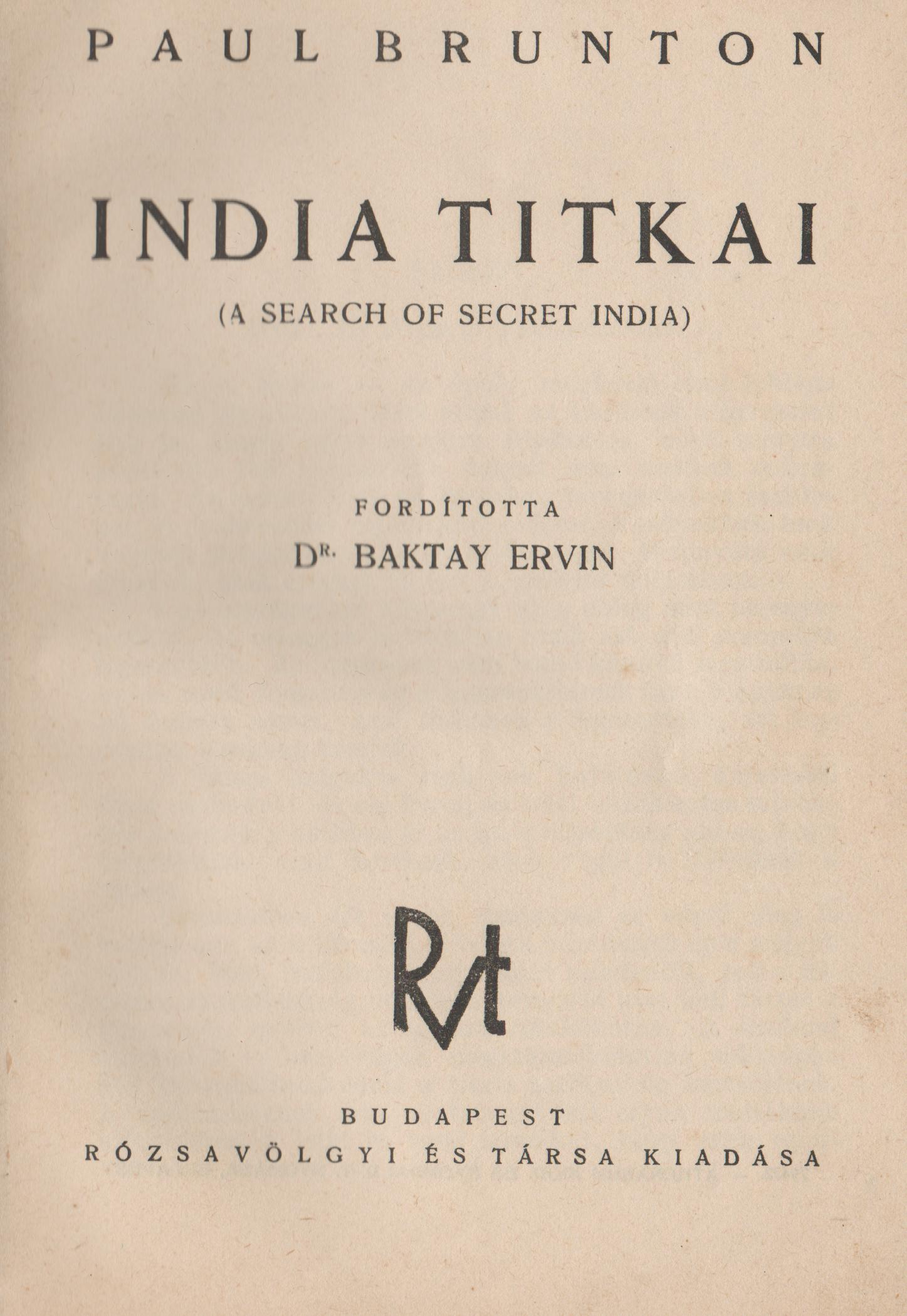 Az adott mű címlapját.